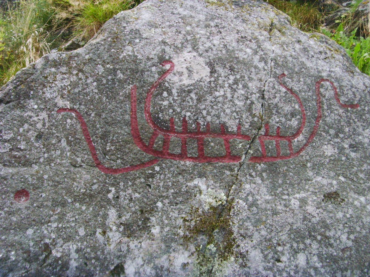 Täljstensbrottet i i Stålkullen i Ytterby är ett av några i Kungälvstrakten i sydligaste Bohuslän, men är ovanlig då här också finns hällristningar, varav fyra skepp och en skålgrop är synliga. Figurristningar är inte speciellt vanliga i södra av detta landskap. Skeppen är dubbellinjiga med uppsvängd stäv och för. På två av dem syns så kallade bemanningsstreck som symboliserar både spant och masnkapet ombord. Utöver skeppen finns här ocks en skålgrop. Platsen utnyttjades från bronsåldern då de djupa figurristningarna ristades i den mjuka täljstenen och ända fram till vikingatiden, då detta stenbrott användes för att bl a göra grytor, sländtrissor och nätsänken av täljsten, vilken gick att skära i med sten. Grytämnen och andra urgröpningar finns fortfarande kvar i berget och kanske användes berget till att göra gjutformar redan under bronsåldern.